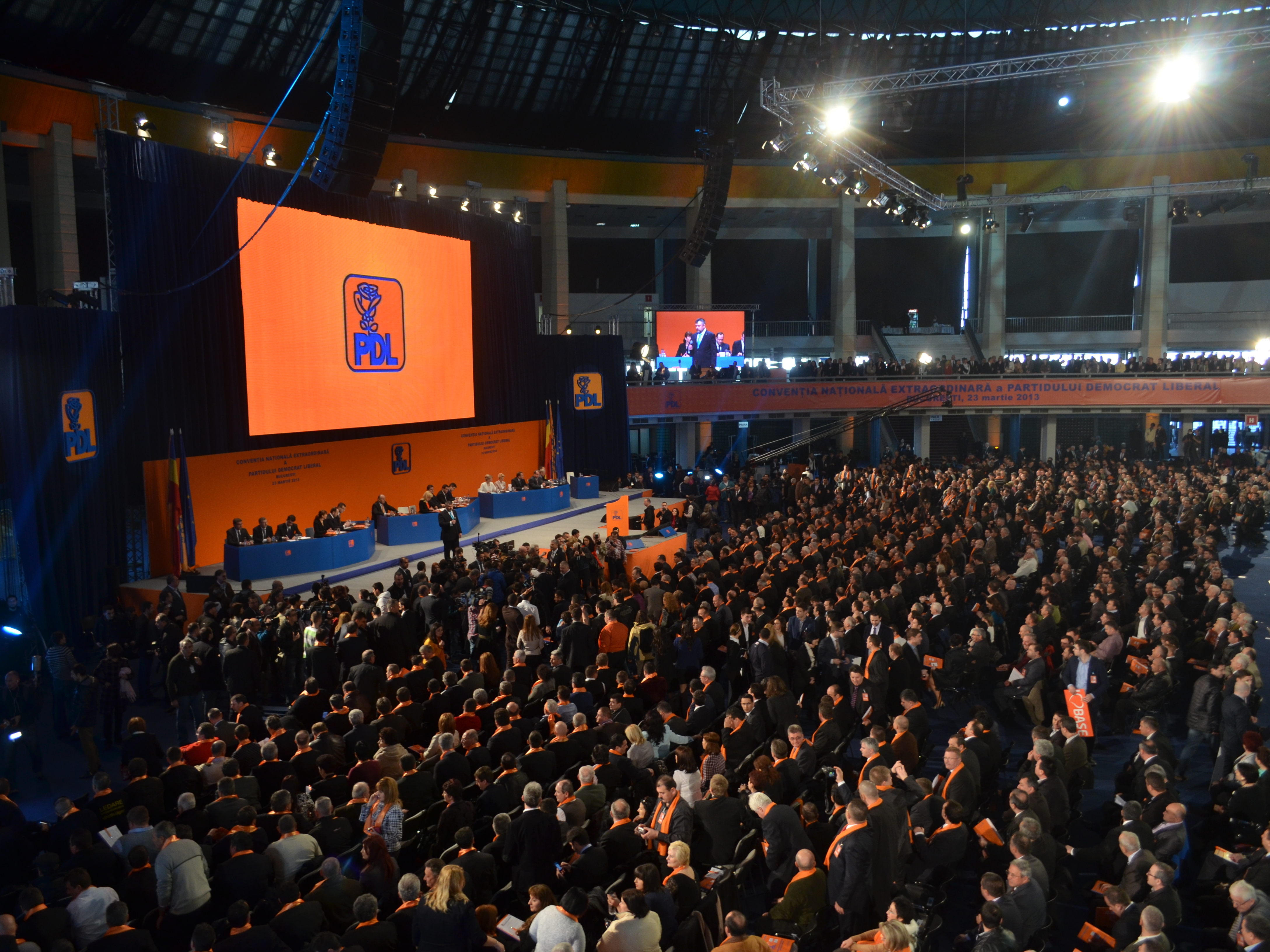 Convenția națională extraordinară a Partidului Democrat-Liberal, 23 martie 2013, București